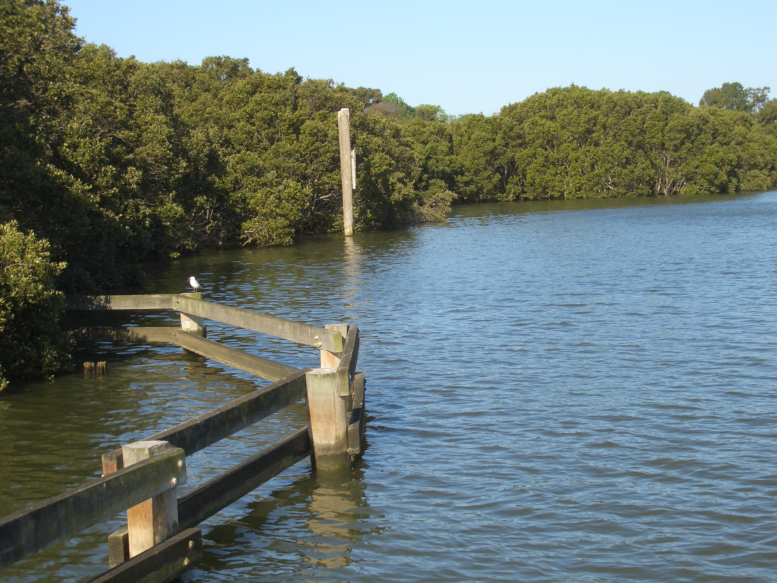 Melrose Park, Parramatta River, Sydney